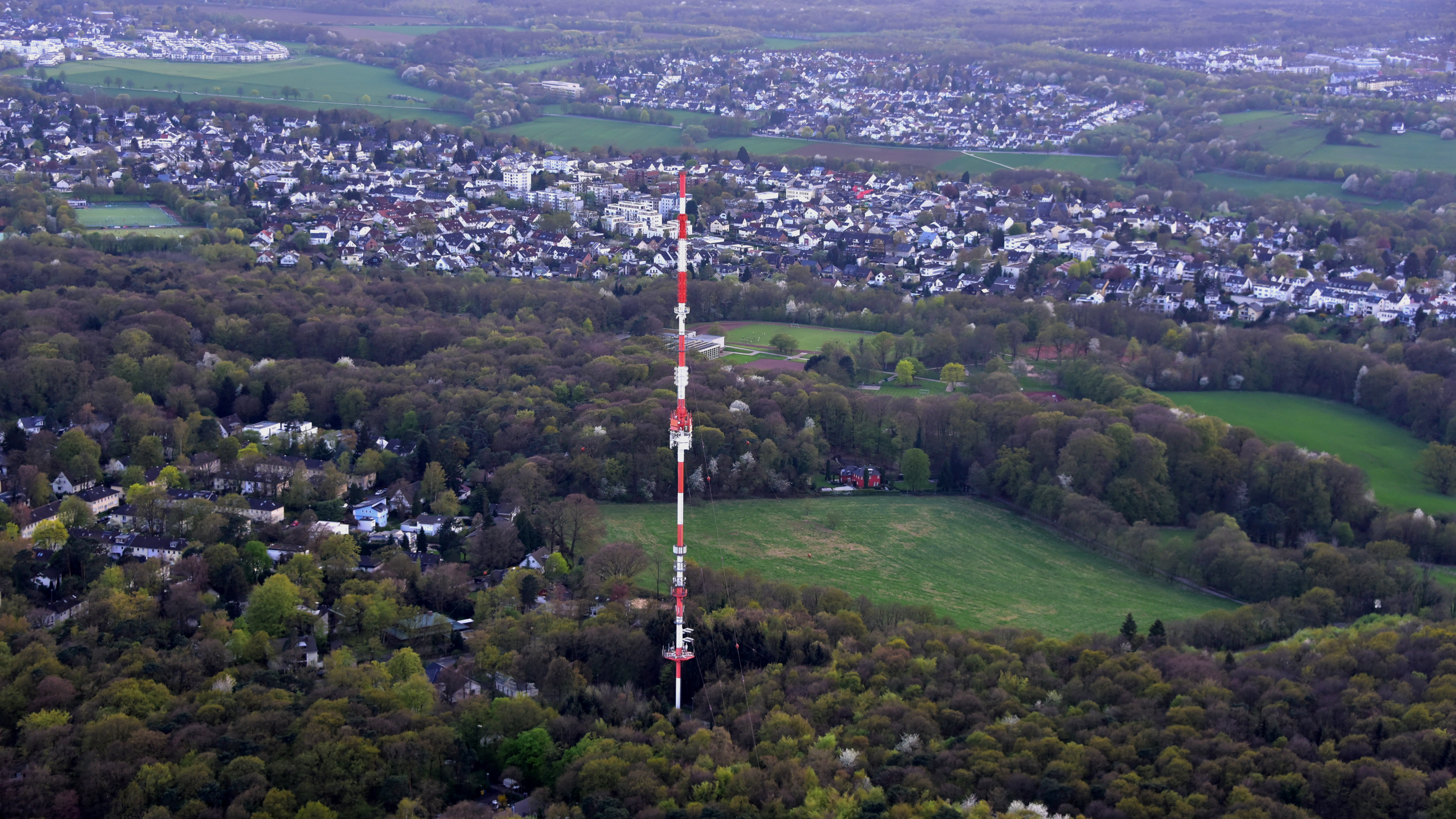 Sender Bonn-Venusberg, Luftaufnahme (2018); vorne links ein Teilbereich des Ortsteils Venusberg, dahinter Ippendorf